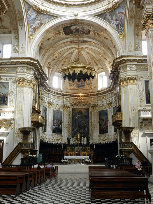 Bergamo - Interno del Duomo